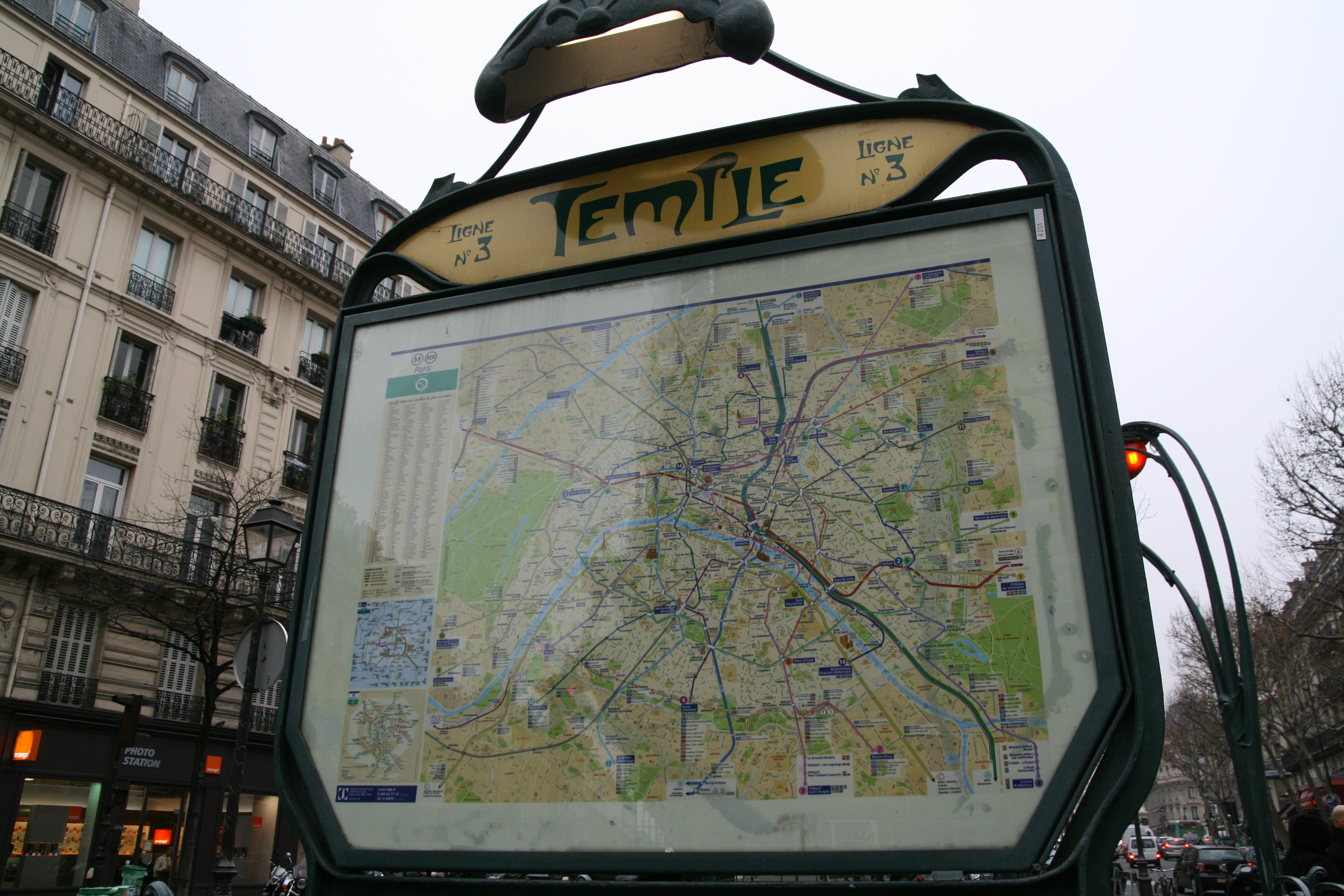 Temple station entrance